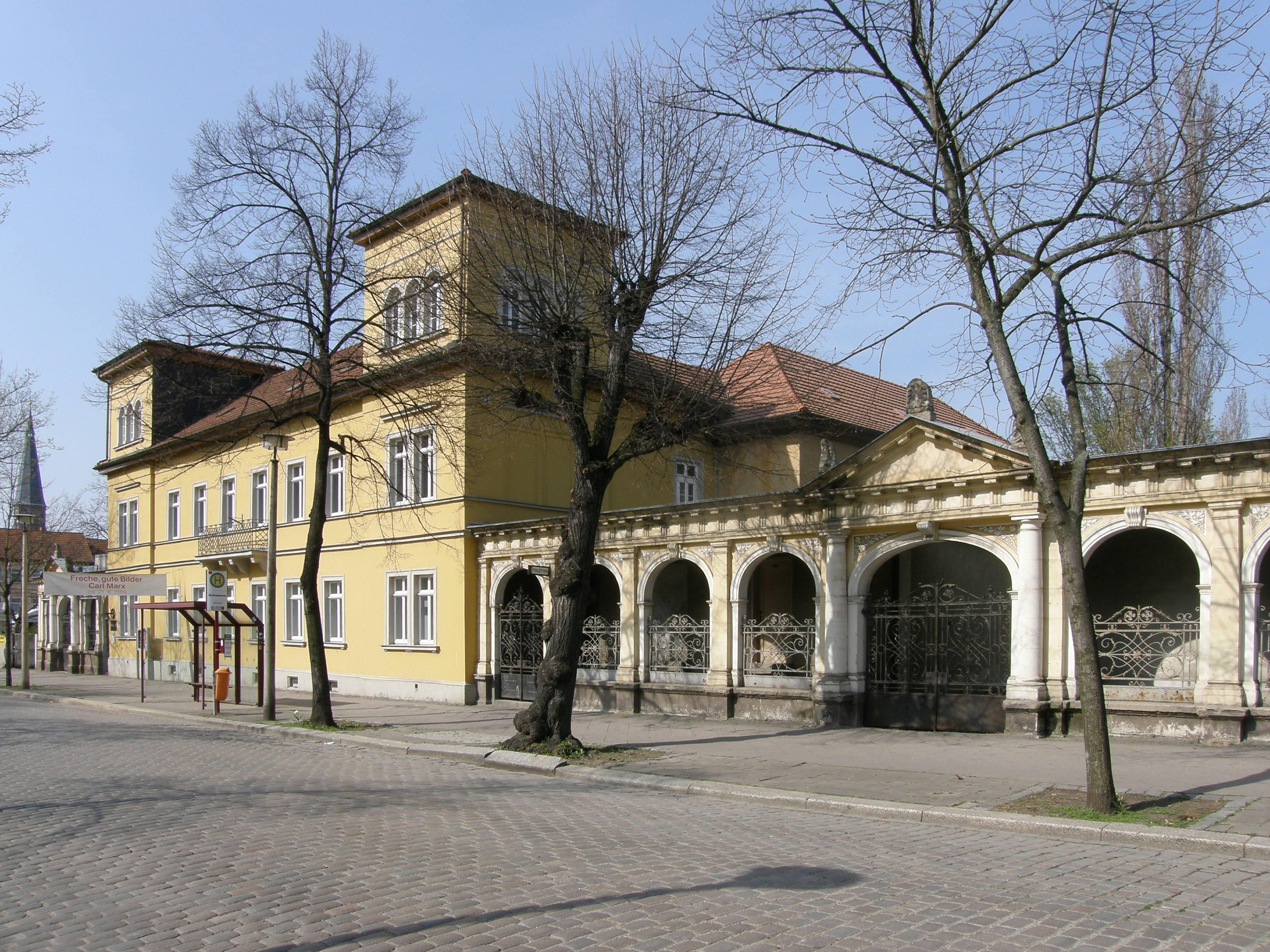 Stadt Apolda - Glockenmuseum mit rechtem Garteneingang